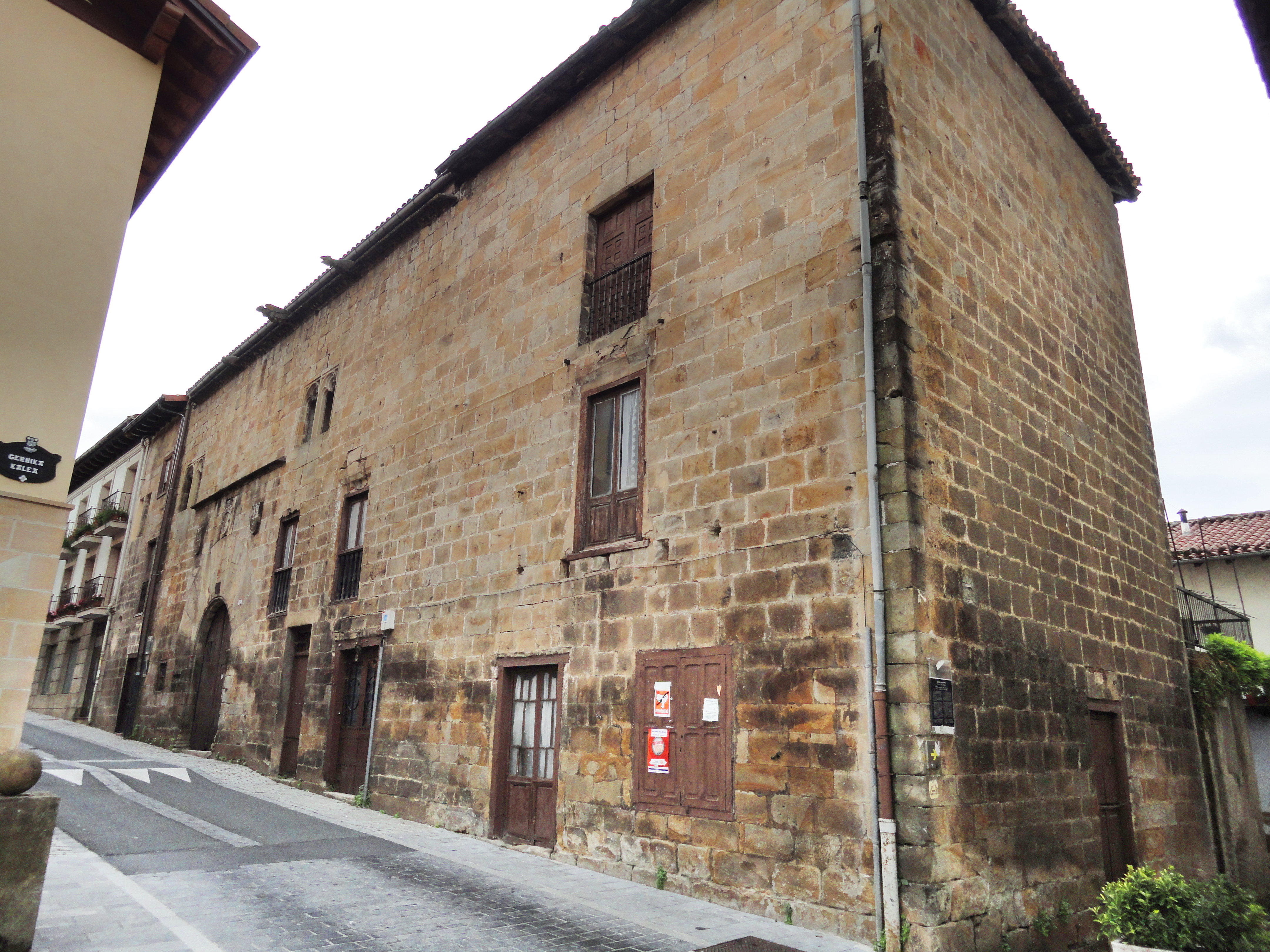 Gebara jauregia - Segura